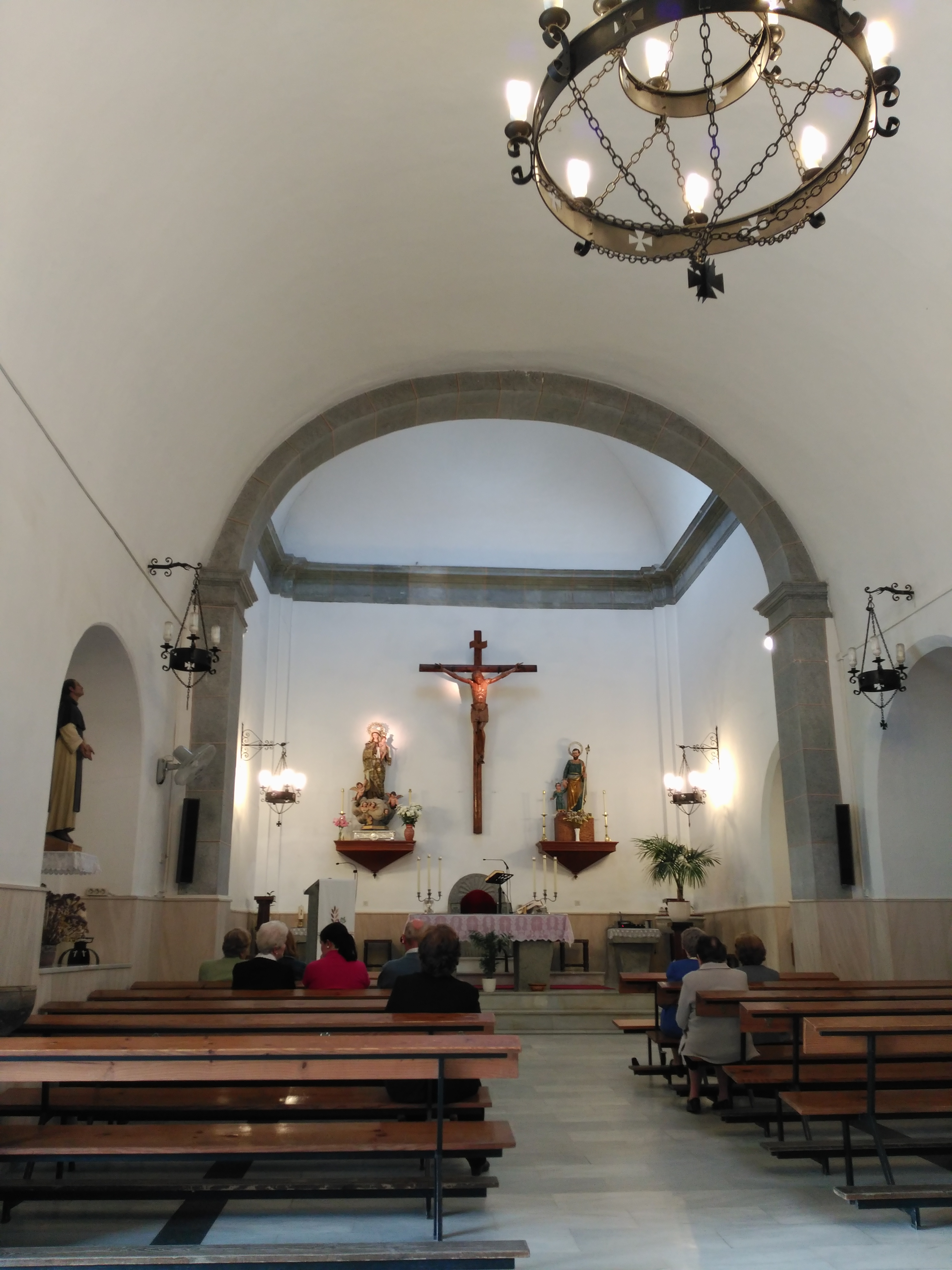 Nave principal de la parroquia de Nuestra Señora del Carmen